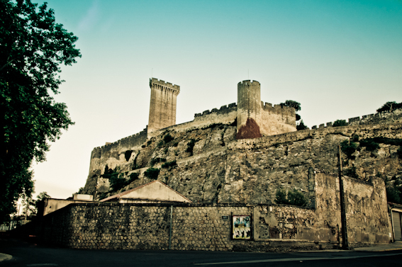 Château de Beaucaire (Gard) vue depuis côté Nord, croisement avenue des anciens combattants et avenue Marius Gardiol